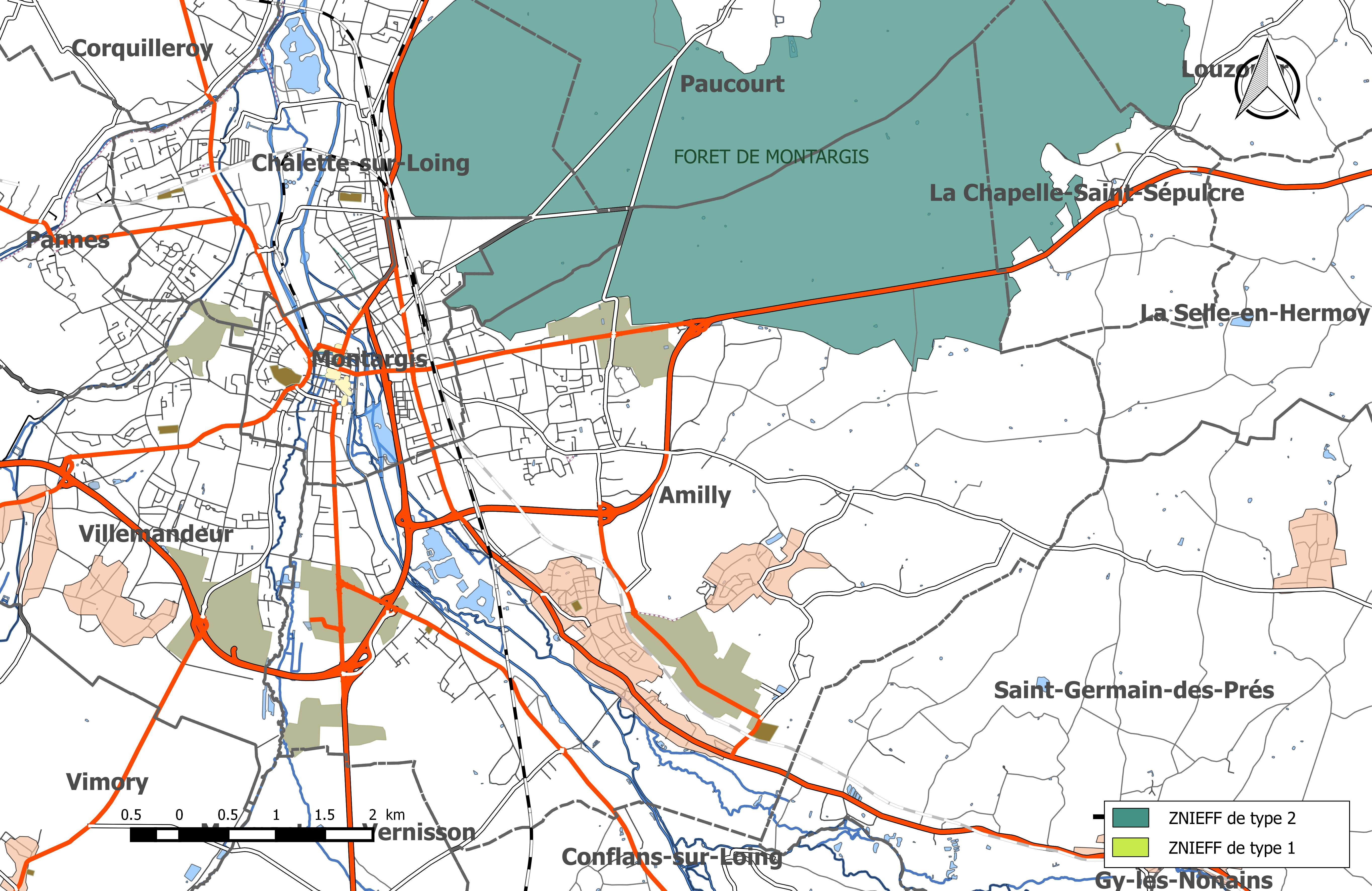 Carte des Zones Naturelles d'Intérêt Écologique Faunistique et Floristique (ZNIEFF) de la commune de Amilly (Loiret).